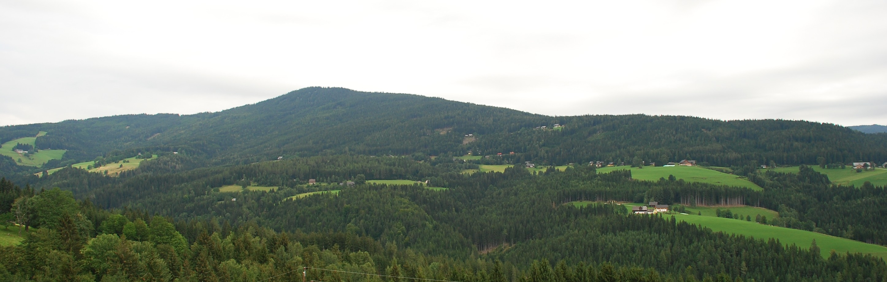 Rettenbach auf dem Südhang des Schwarzkogels